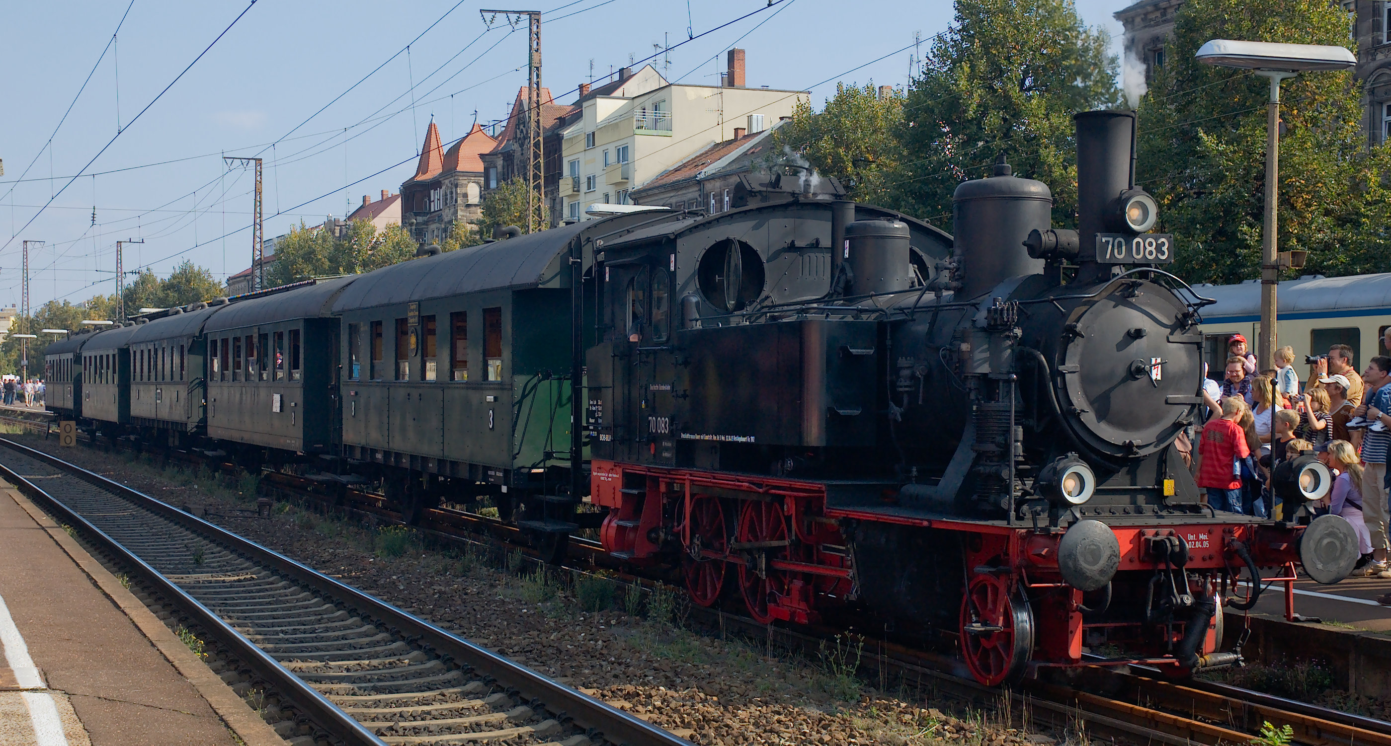 Dampflok 70-083 im Hauptbahnhof Fürth